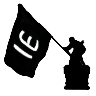 Logo e isotipo de Integración Estudiantil.